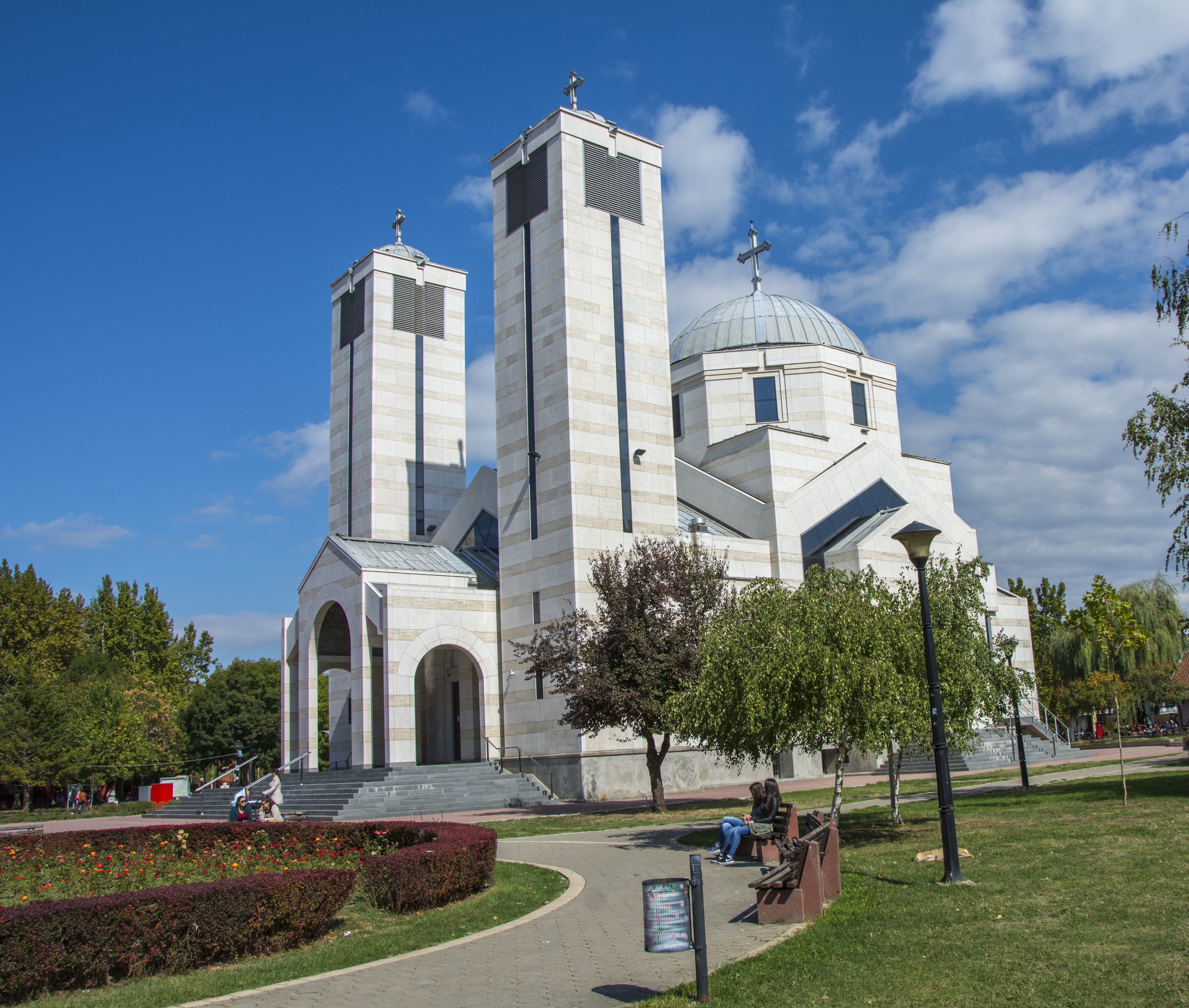 Град Ниш